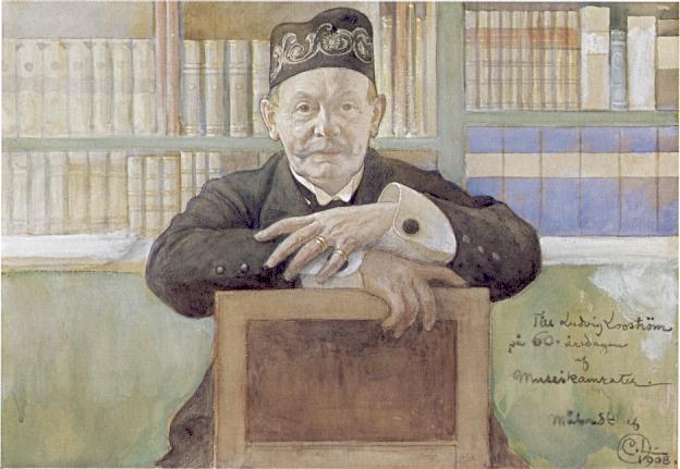 Carl Ludvig Looström (1848-1922). Portrait.